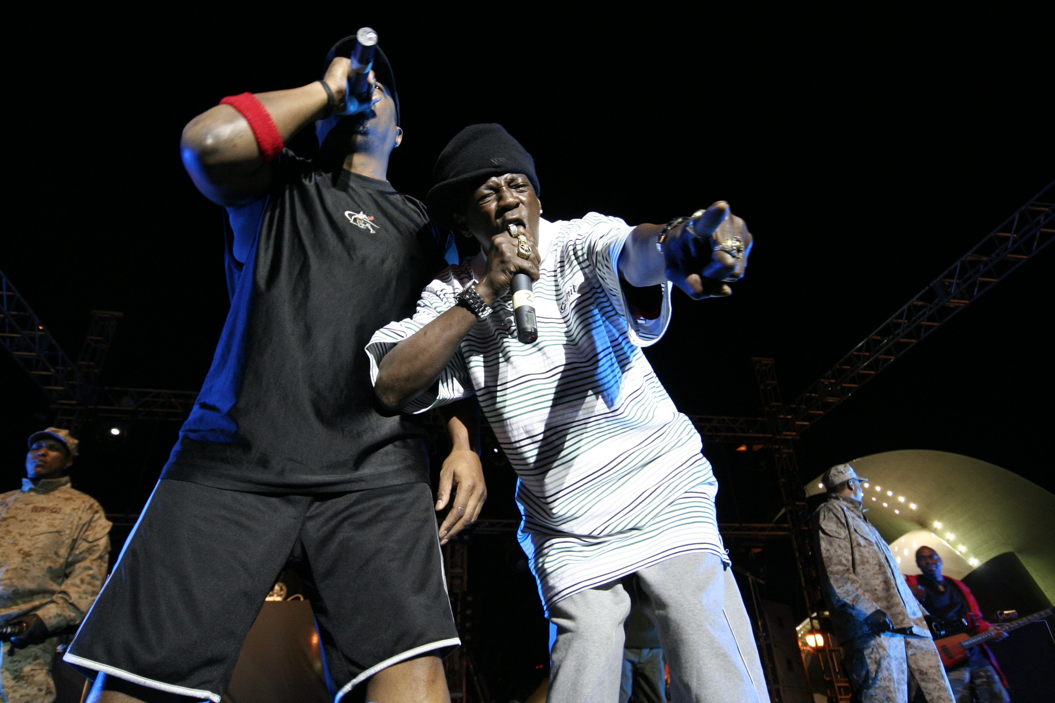 Public Enemy @ Castillo Negro - Tenerife - Islas Canarias - 20/04/2007